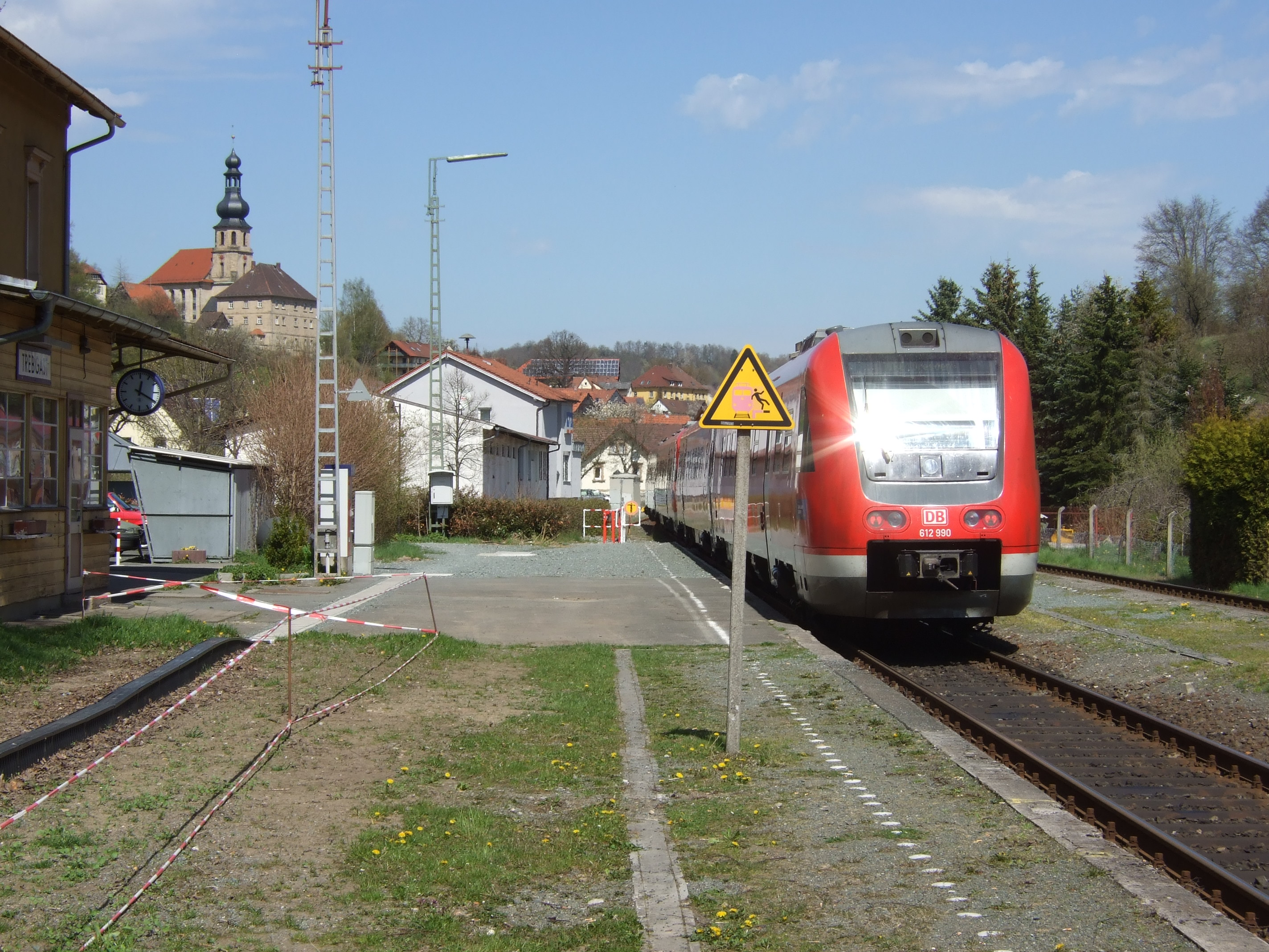 Bahnhof und Kirche Trebgast